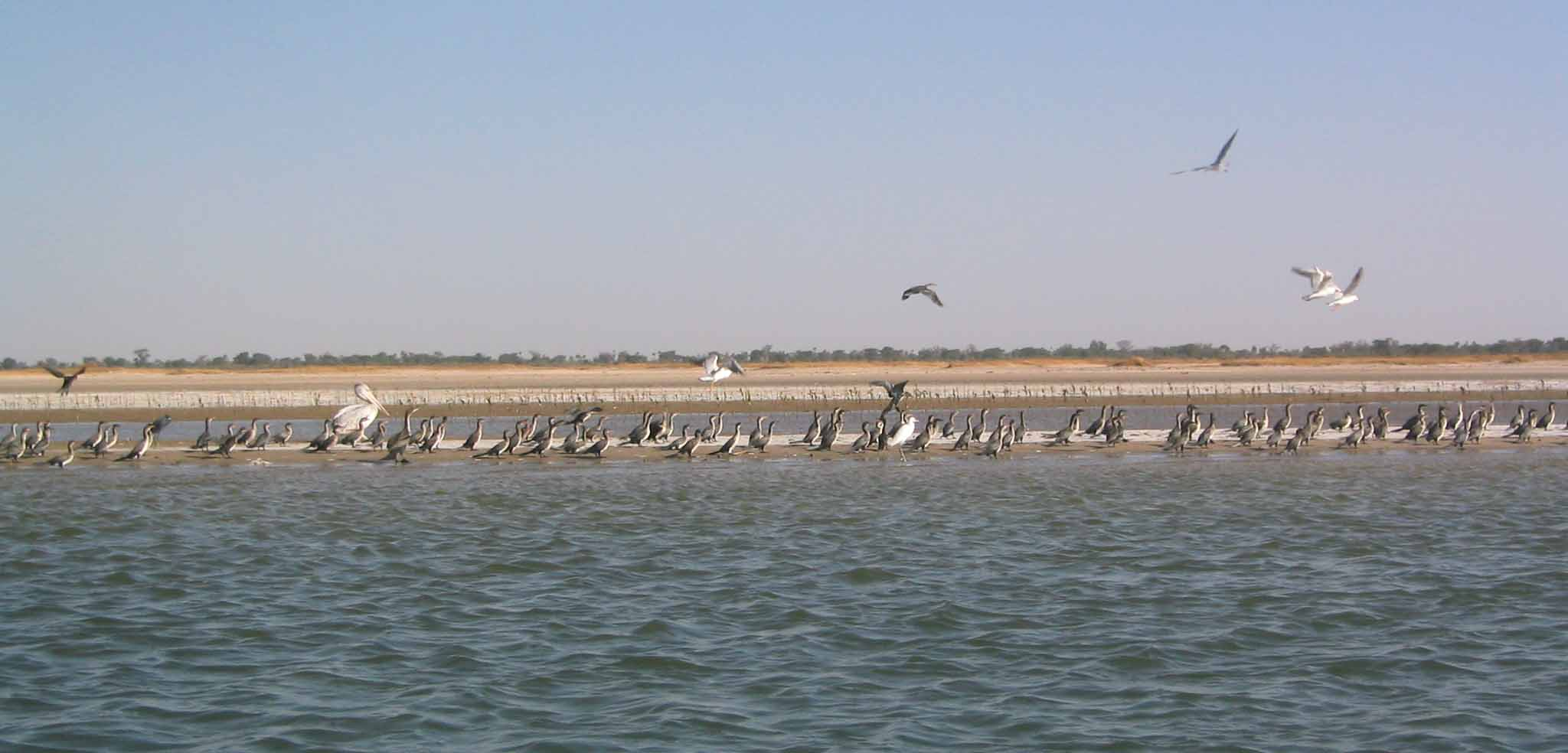 L'île des oiseaux dans le delta du Saloum (à proximité de Mar Lodj) au Sénégal